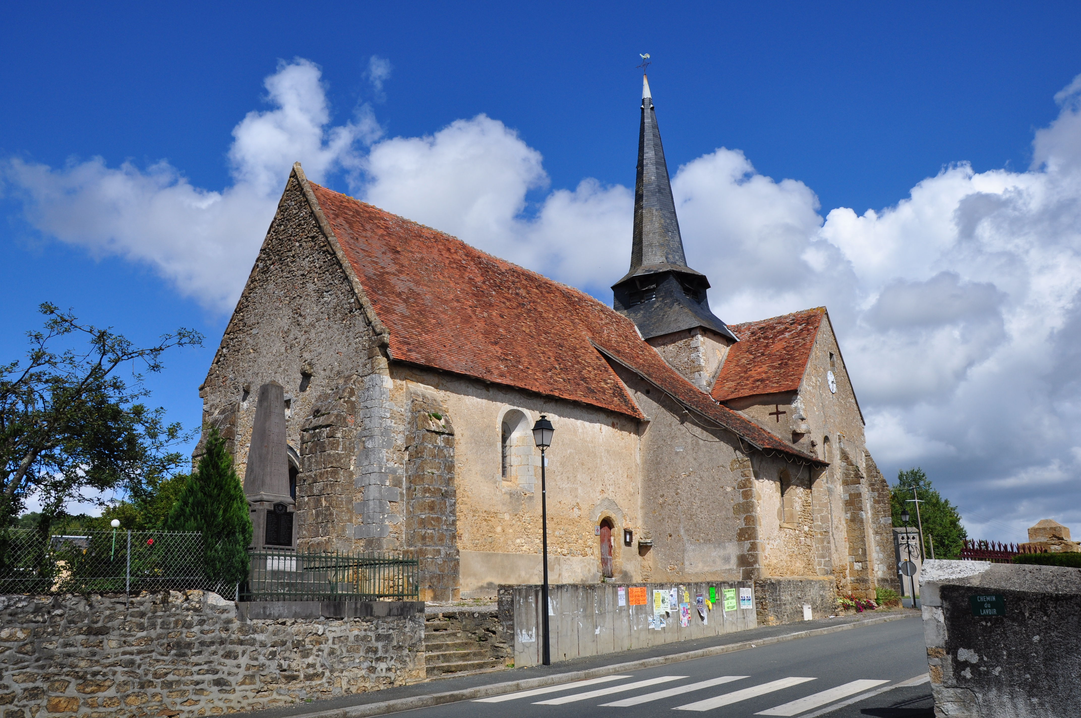 Eglise St André - Chavin (Indre)